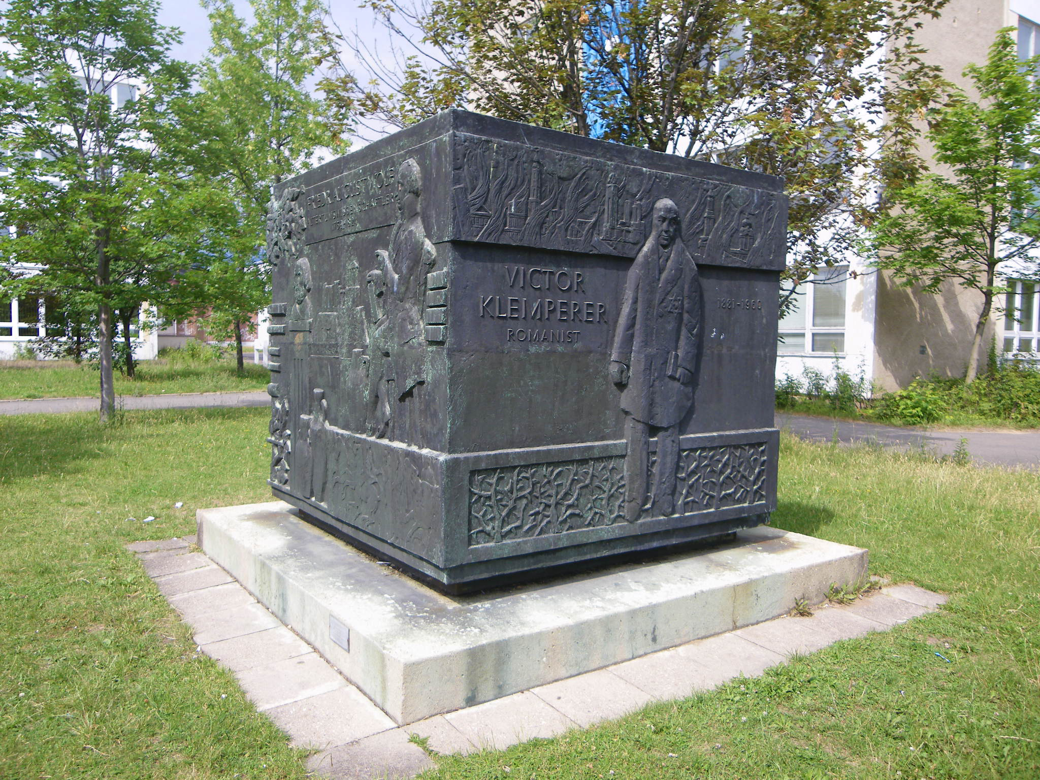 Gerhard Geyer (1907-1989), Vier Wissenschaftler aus vier Jahrhunderten der Martin-Luther-Universität Halle (Wissenschaftswürfel), 1972, Bronze Nietlebener Straße 14